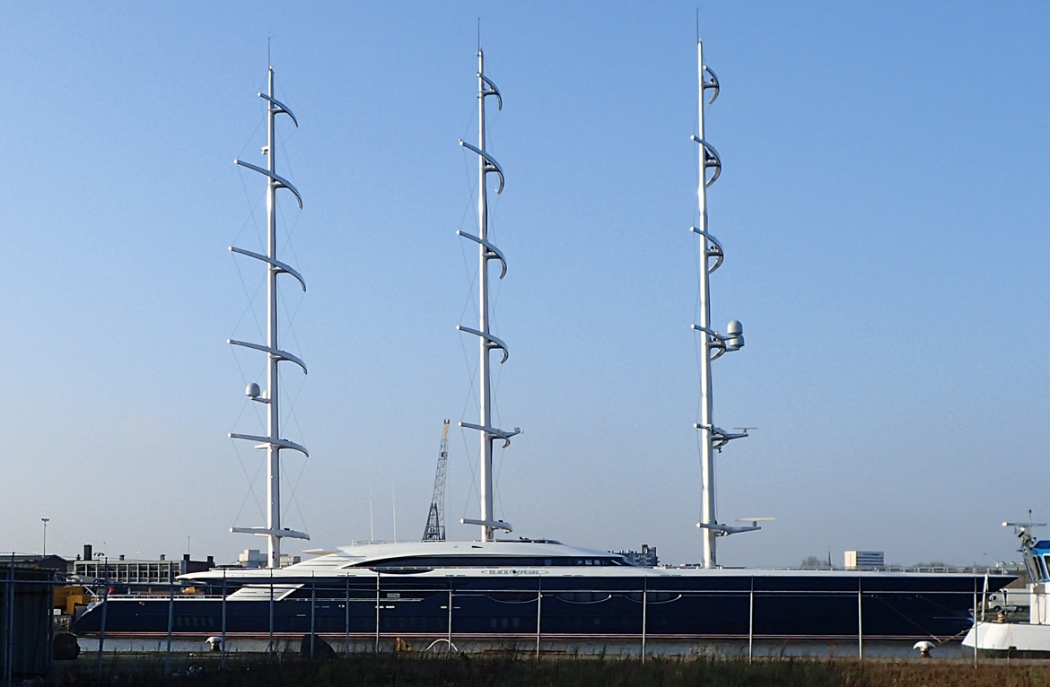 Mega Yacht Black Pearl in Rotterdam